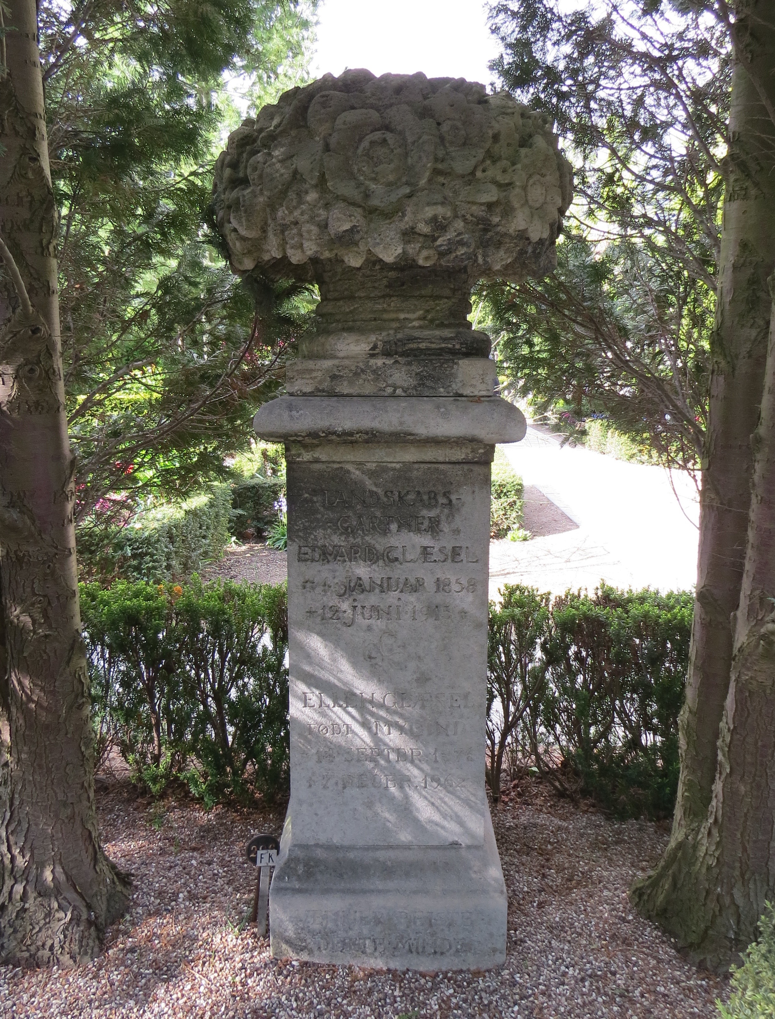 Gravminde for landskabsgartner Edvard Glæsel, Frederiksberg Ældre Kirkegård